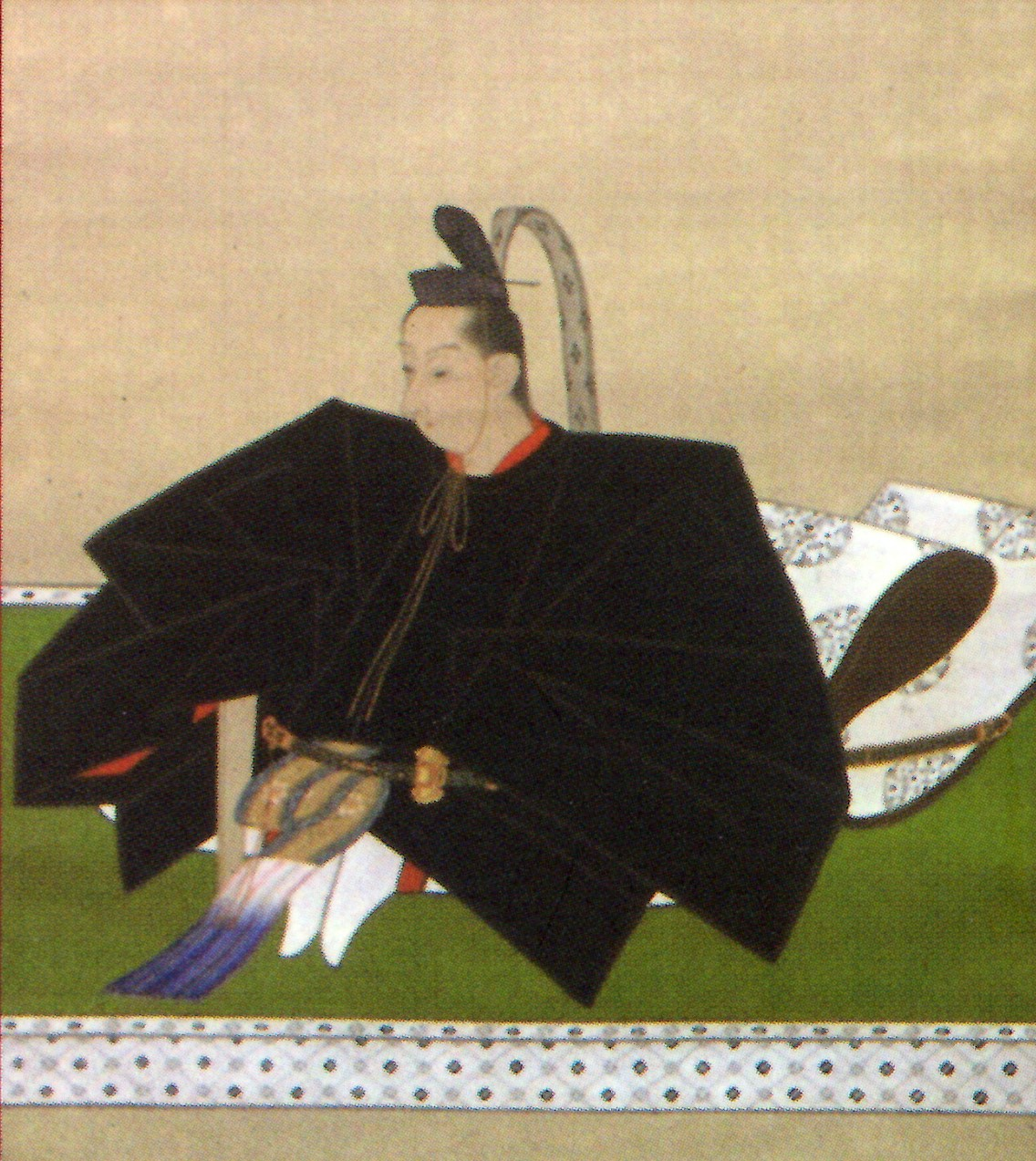 毛利元周の肖像。